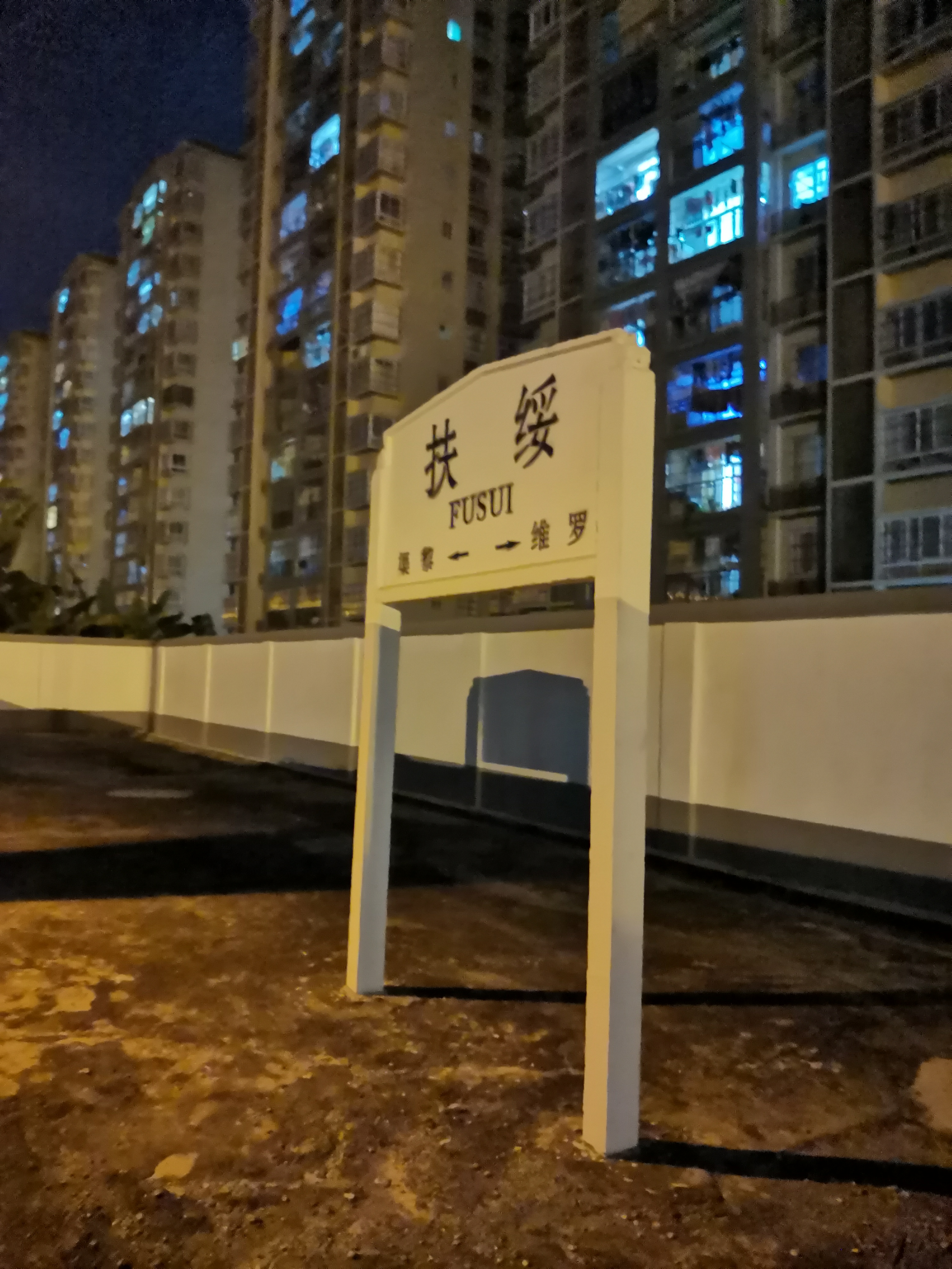 广西崇左 扶绥火车站